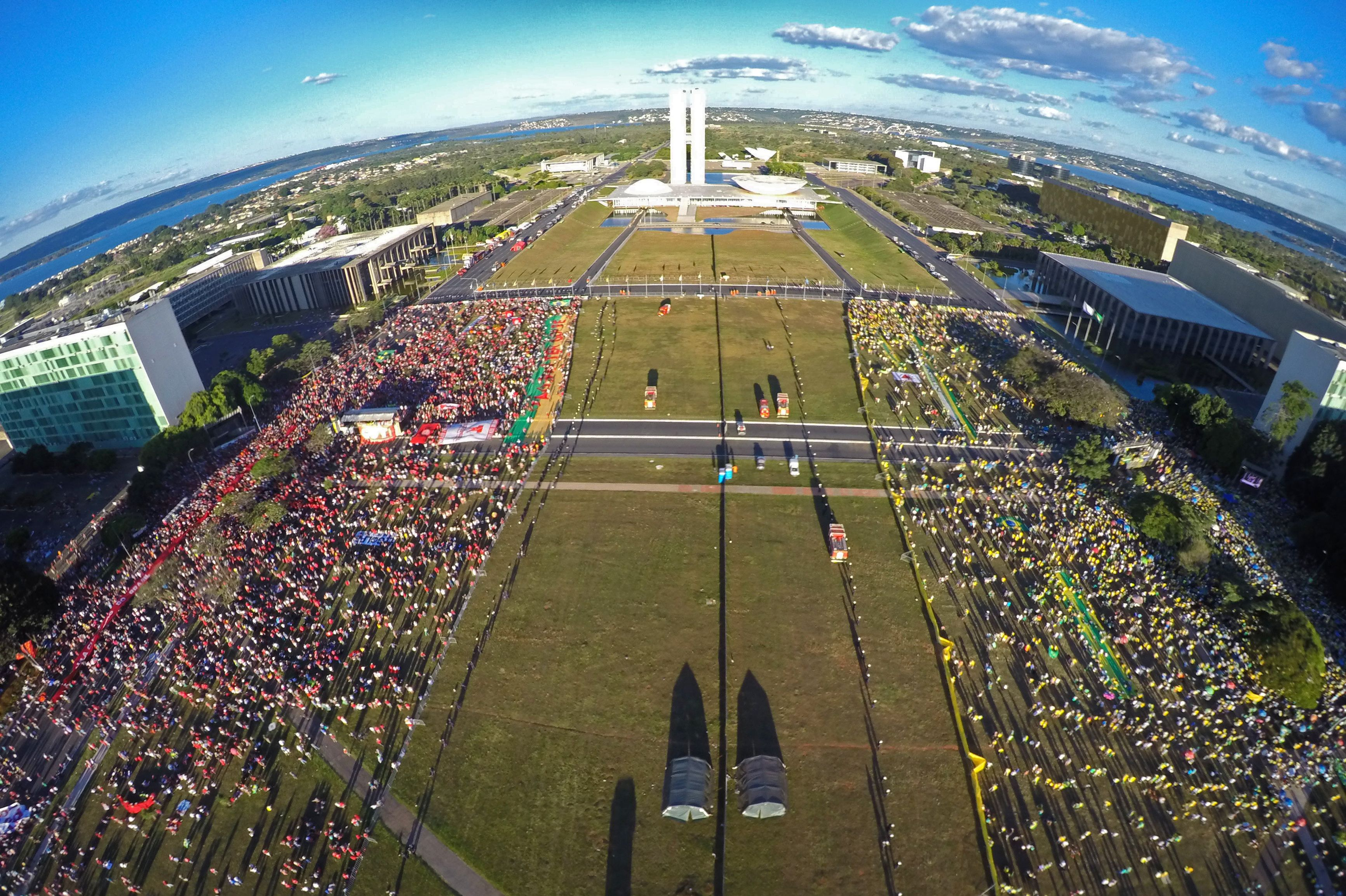 Brasília - Manifestantes a favor (que estão no lado direito) e contra (que estão no lado esquerdo) o impeachment ocupam a Esplanada dos Ministérios durante o processo de votação na Câmara dos Deputados.